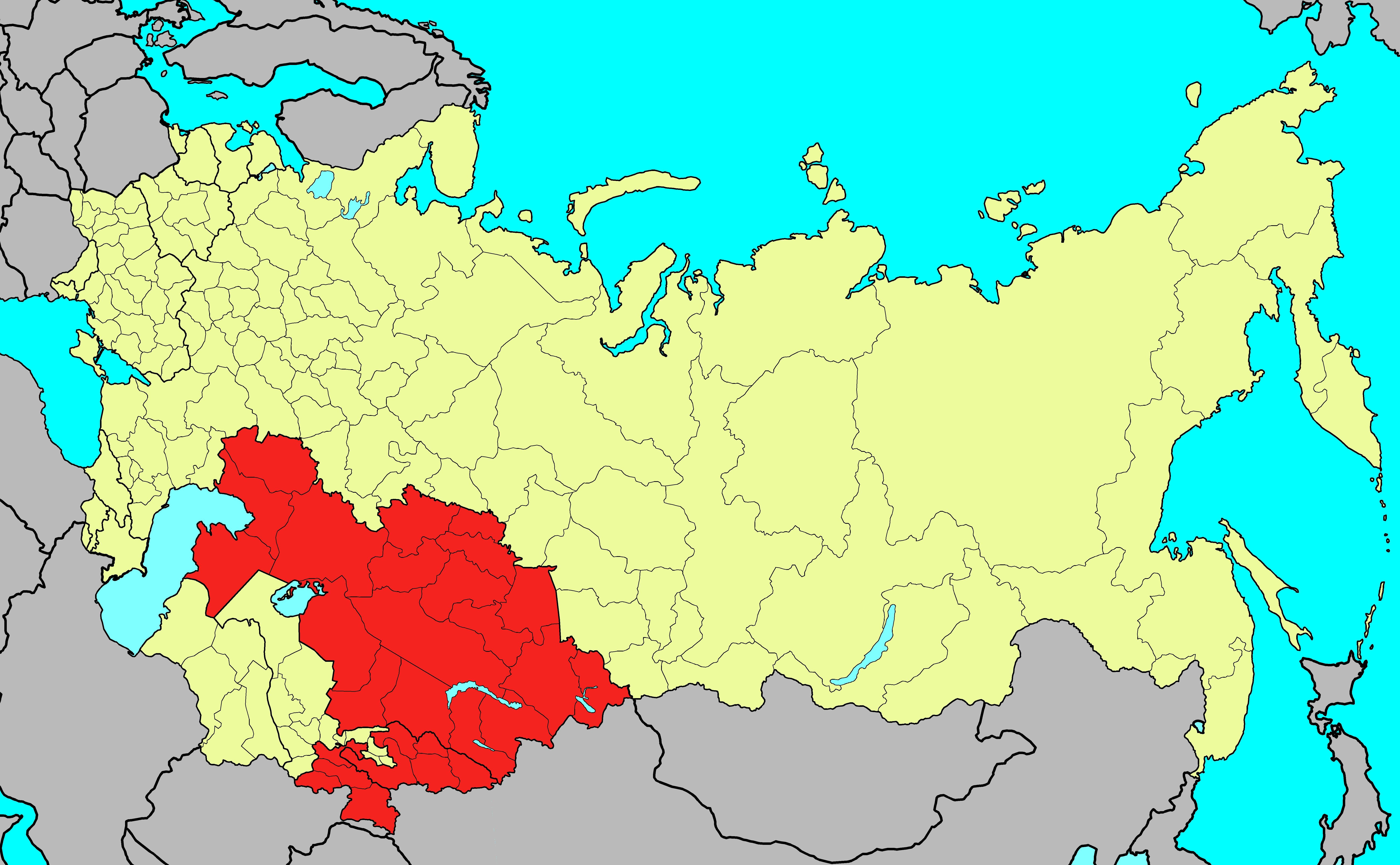 Среднеазиатский военный округ ВС СССР на 1 января 1989 года